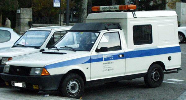 Emelba Ronda taller.